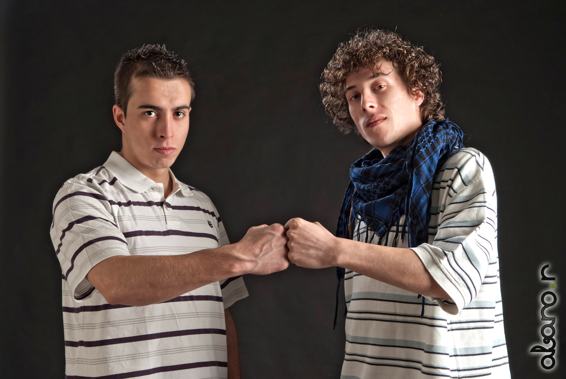 Santa Morte, grupo español de Hip Hop.